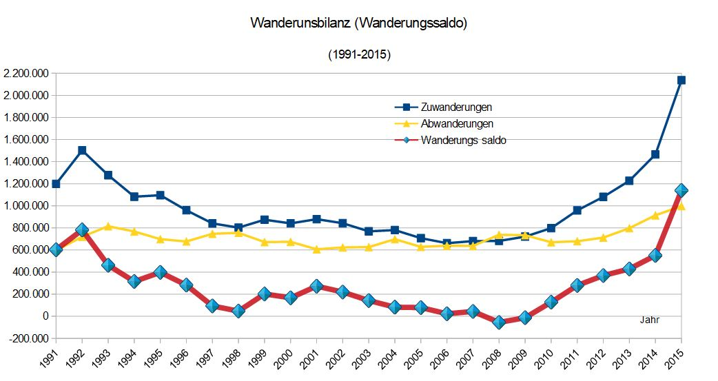 Wanderungsbilanz 1991-2015